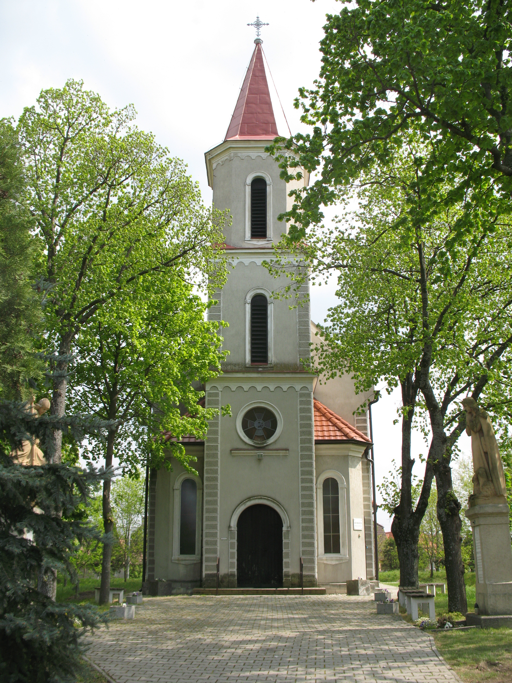 Felsőjányok